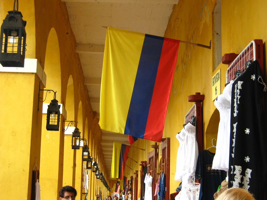 Colombia